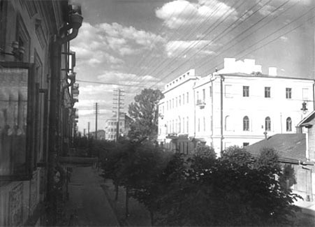 Улица К.Маркса. г. Во втором здании справа в 1920-30-е годы находился Центральный Комитет Коммунистической партии Беларуси. Теперь - Национальный музей истории и культуры Беларуси.